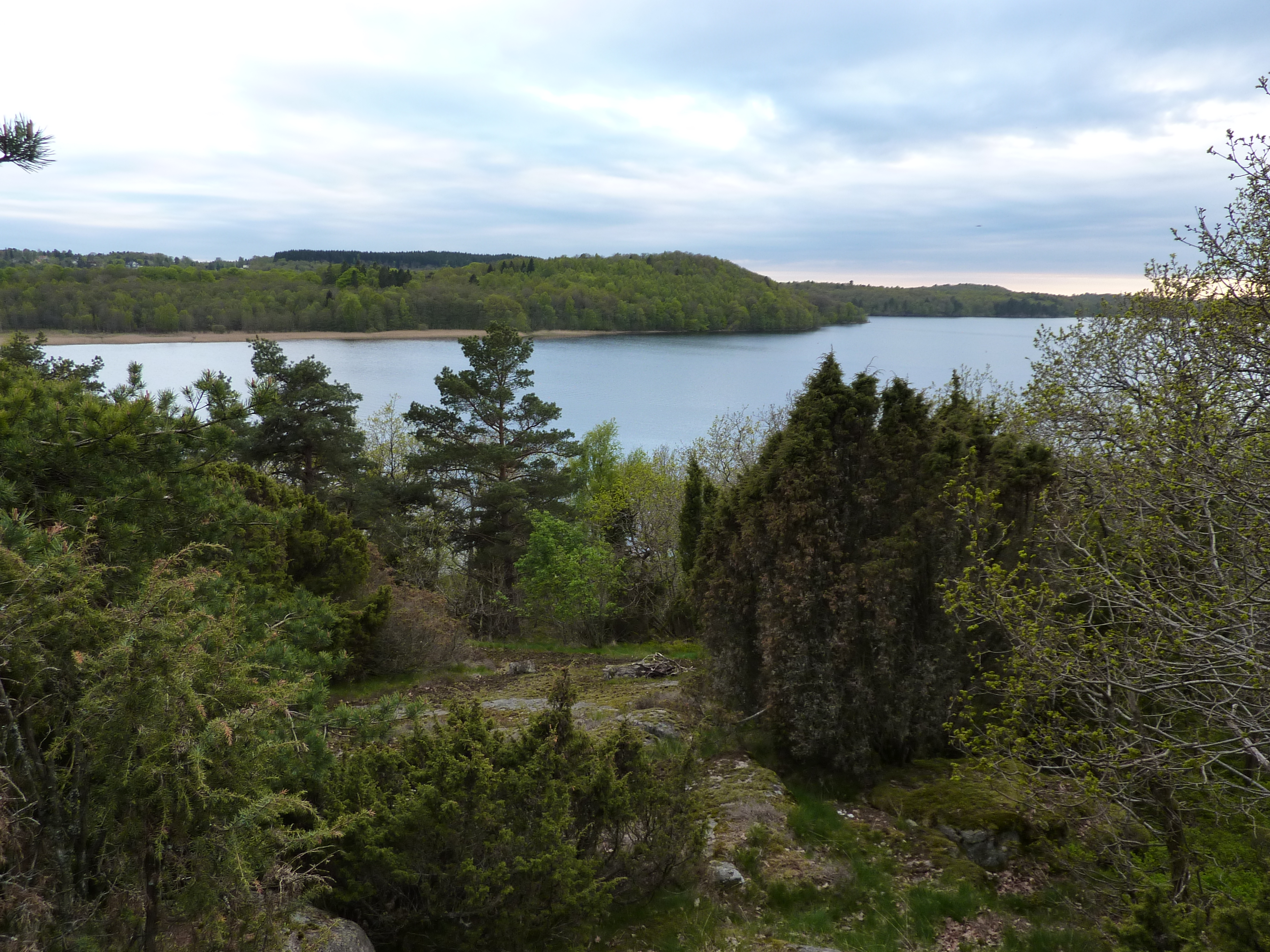 View over Rådasjön, Västra Götaland, Sweden